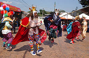 Dia de San Sebastian